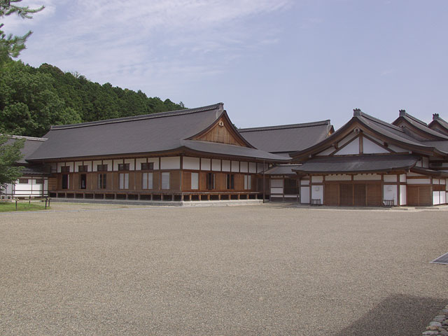 大本の聖地・梅松苑の「長生殿」